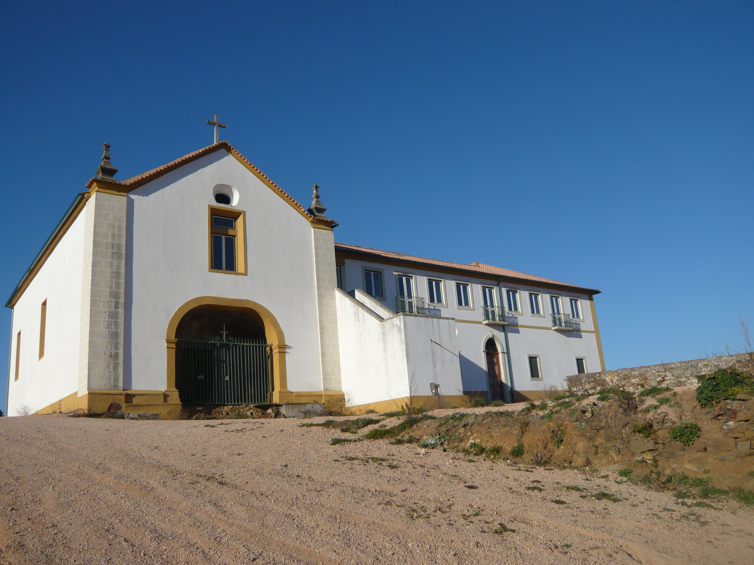 Convento de Santo Antonio, Sertã